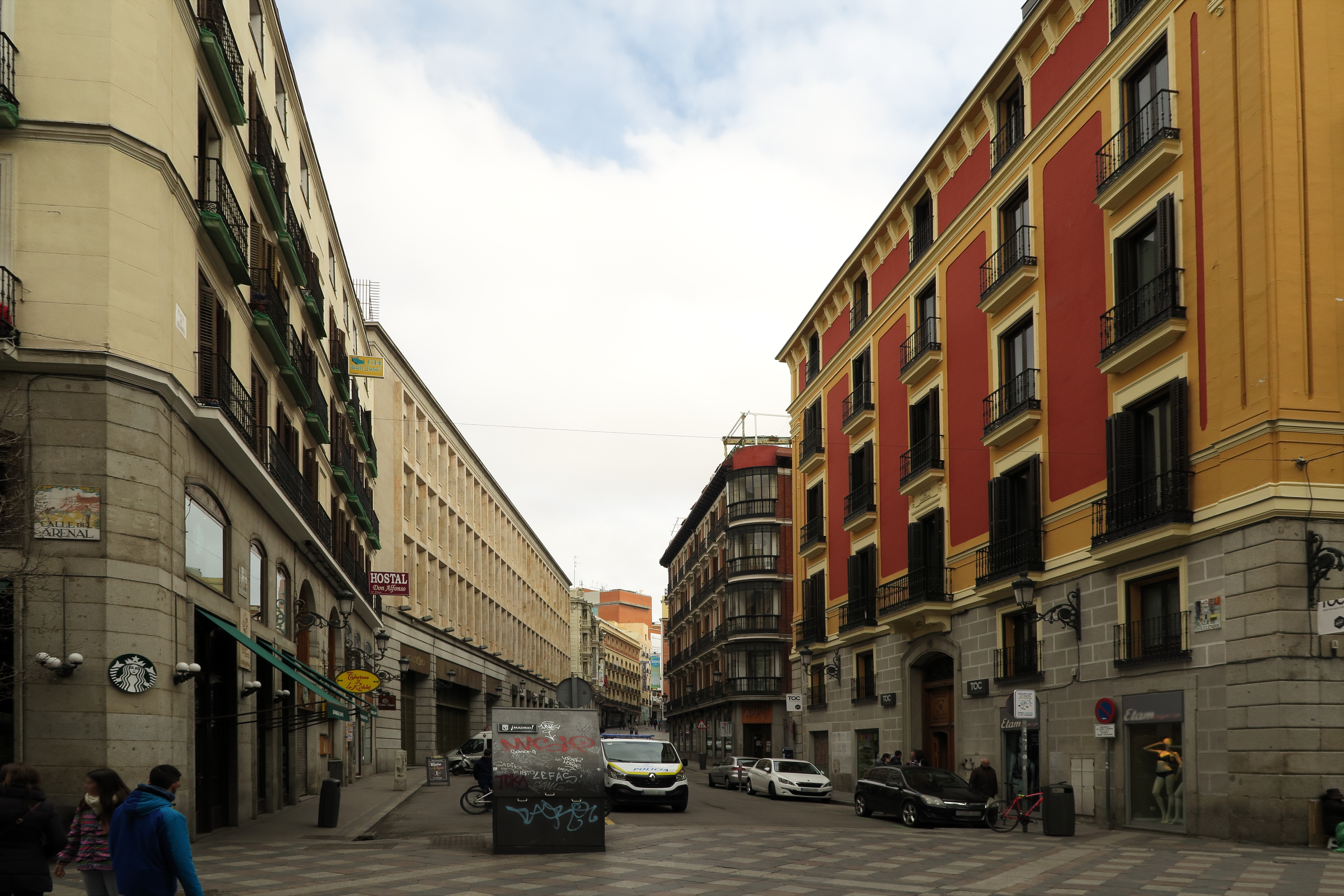 Plaza de Celenque